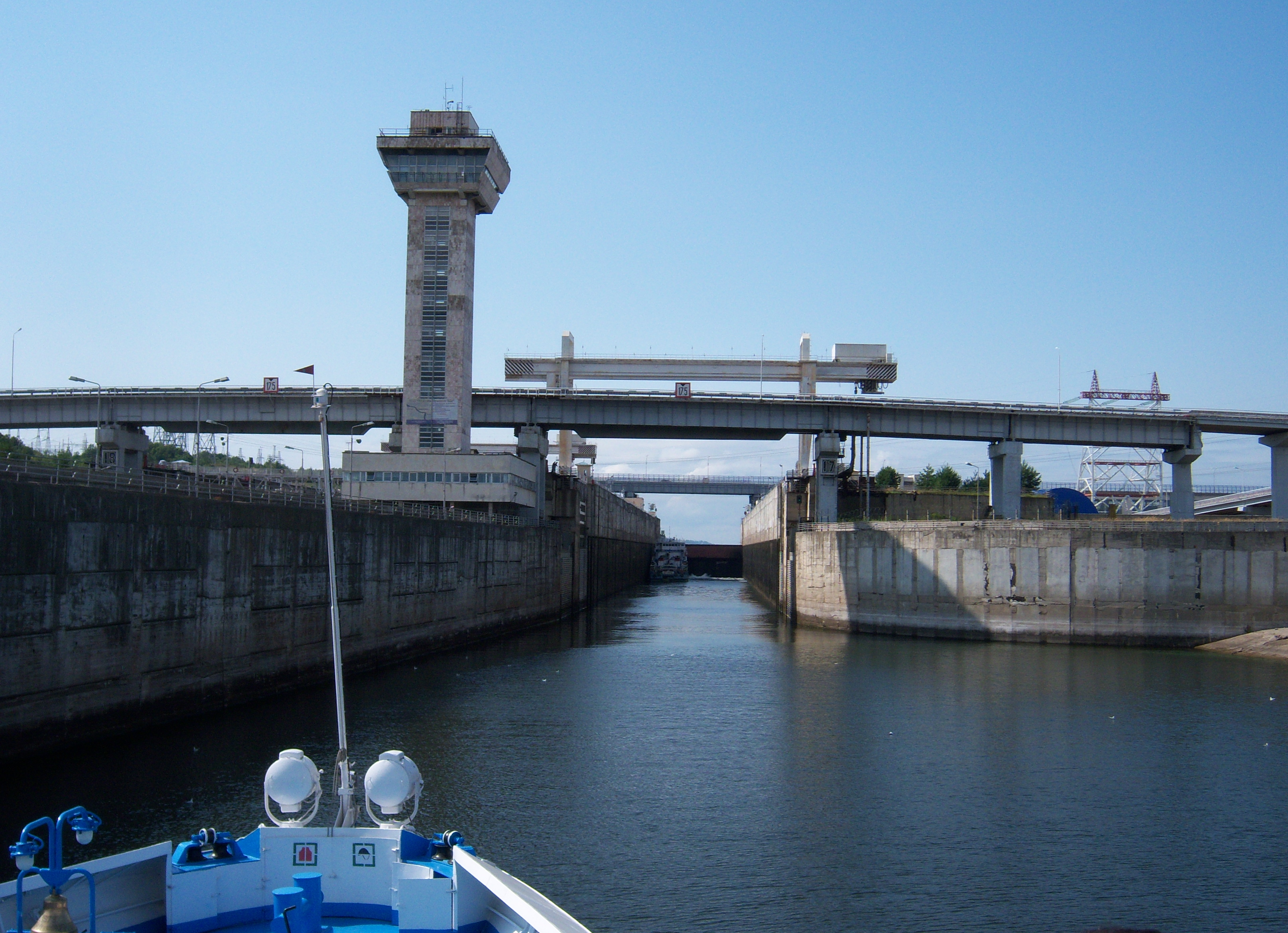 Das Flußkraftwerk Tscheboksary an der Wolga